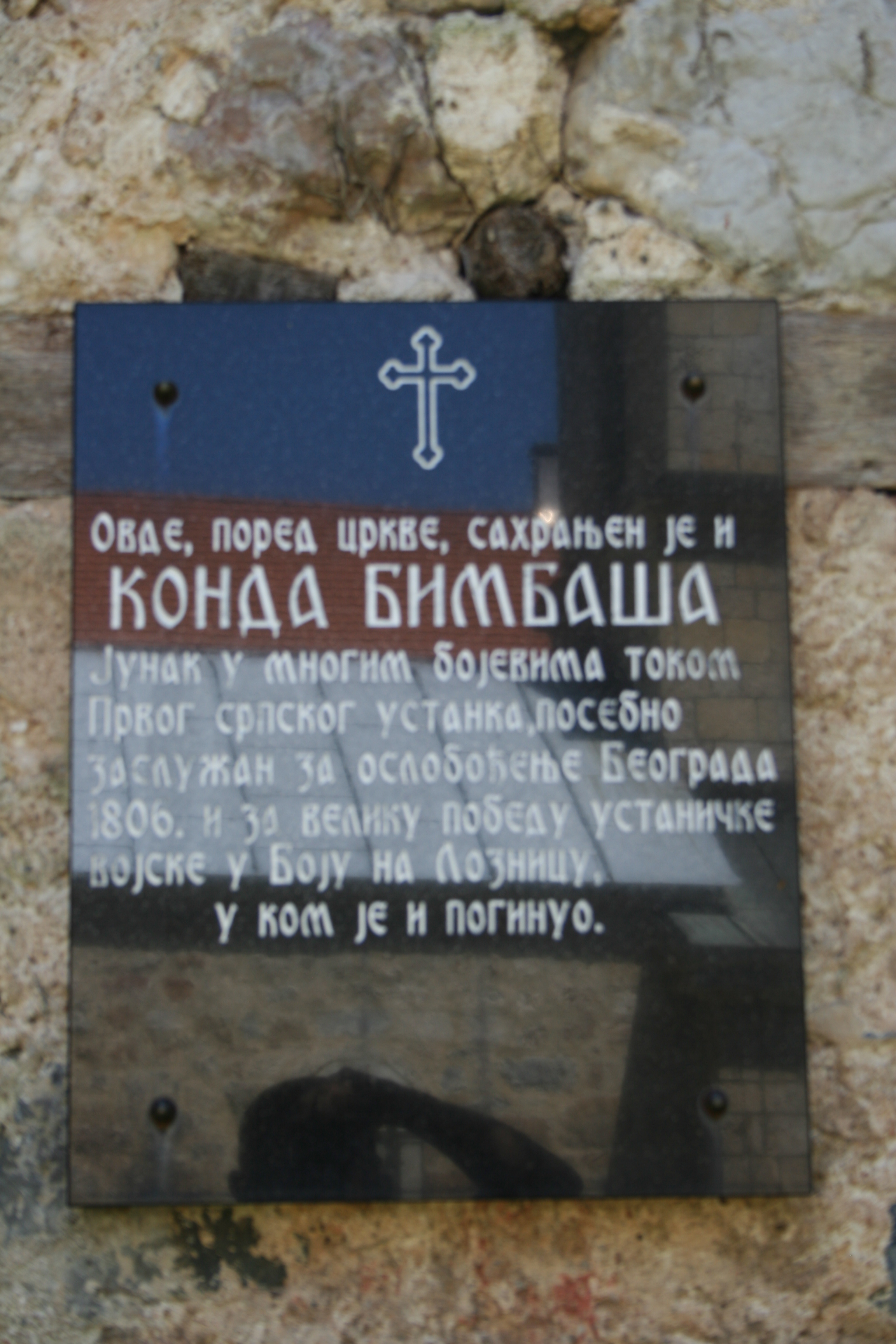 Manastir Tronoša